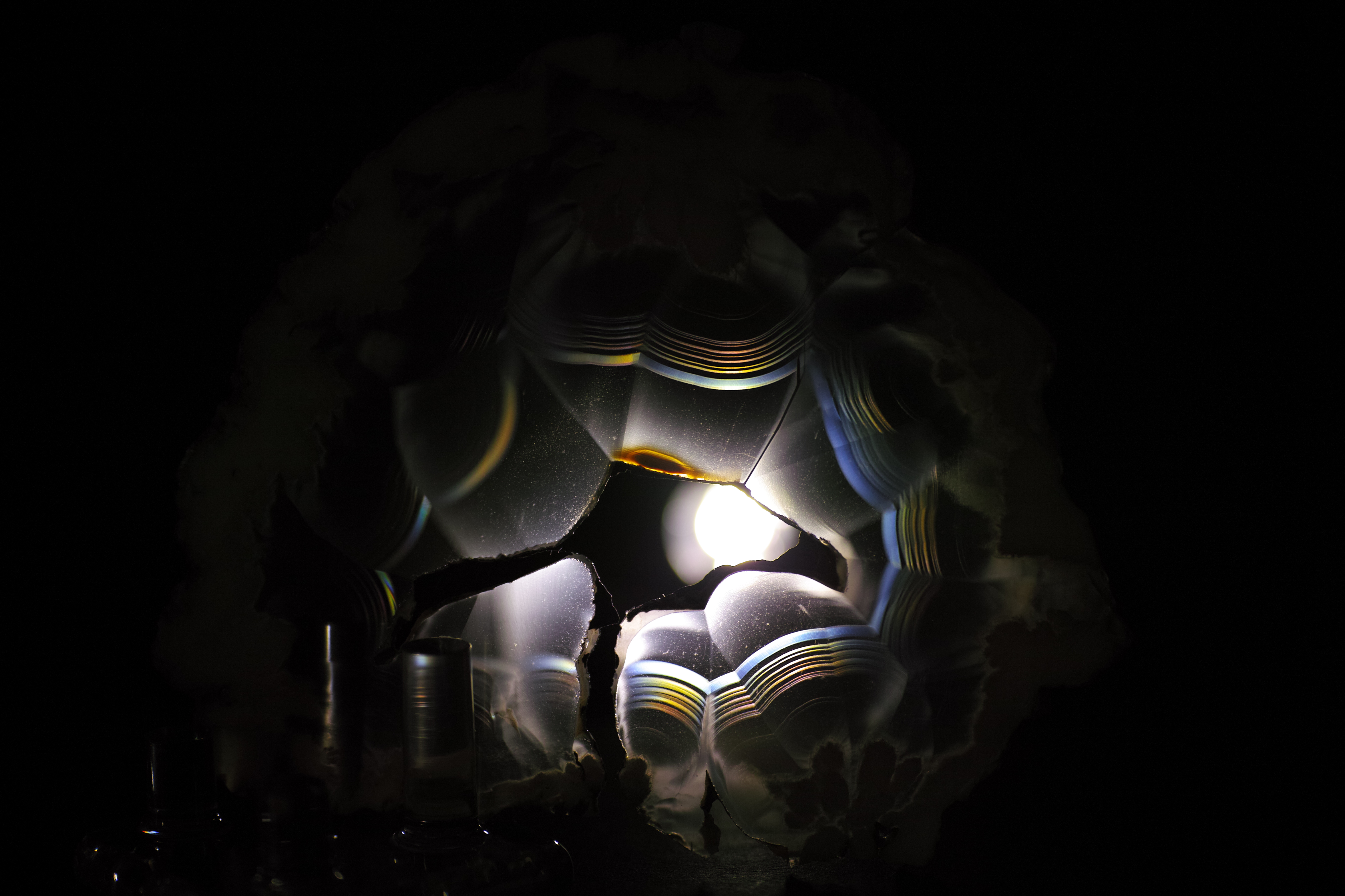 Iris Agate(Agatized Petrified Wood) from Stinking Water, Oregon, U.S.A.